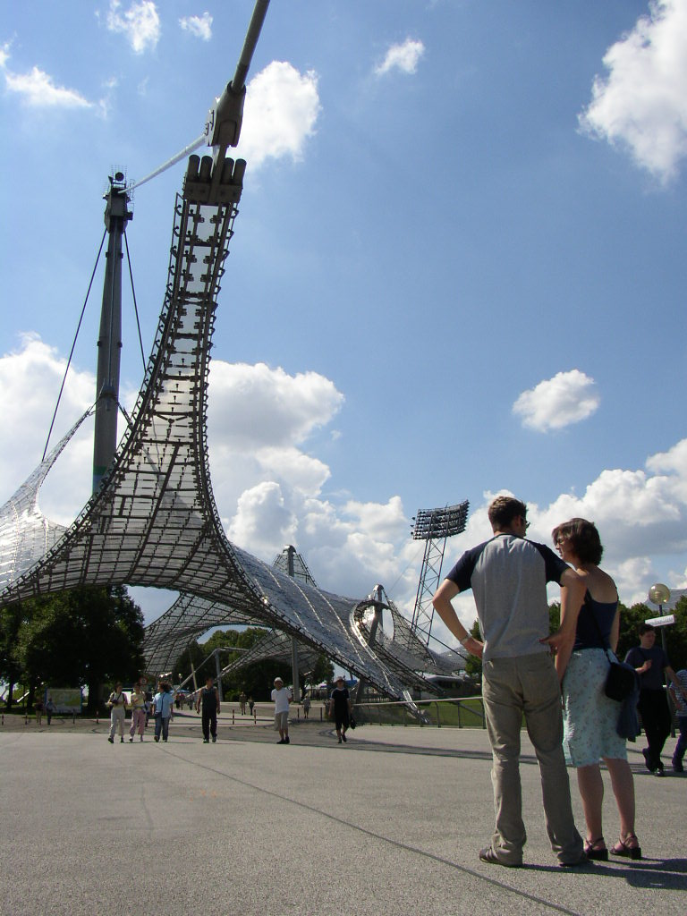 Olympijský areál Mníchov 1971, Nemecko.